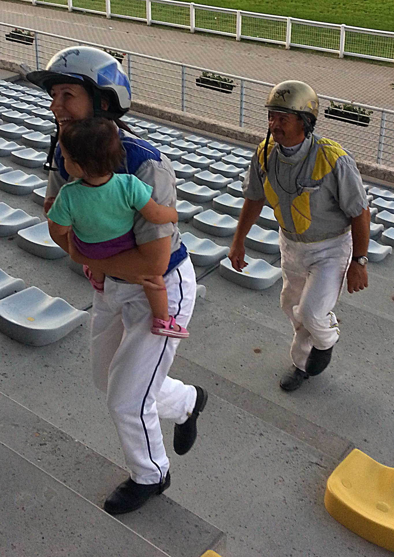 Fazekas Imre és Fazekas Andrea a díjátadásra igyekszik. Az „Ötévesek nagydíja“ ügető versenyen a Fazekas istálló három lova került a dobogóra. 1. Fazekas Andrea (Ollyan nincs); 2. Fazekas Imre (Oguz); 3. Nagyváry Andrea (Orlando. Bloom). Kincsem Park.